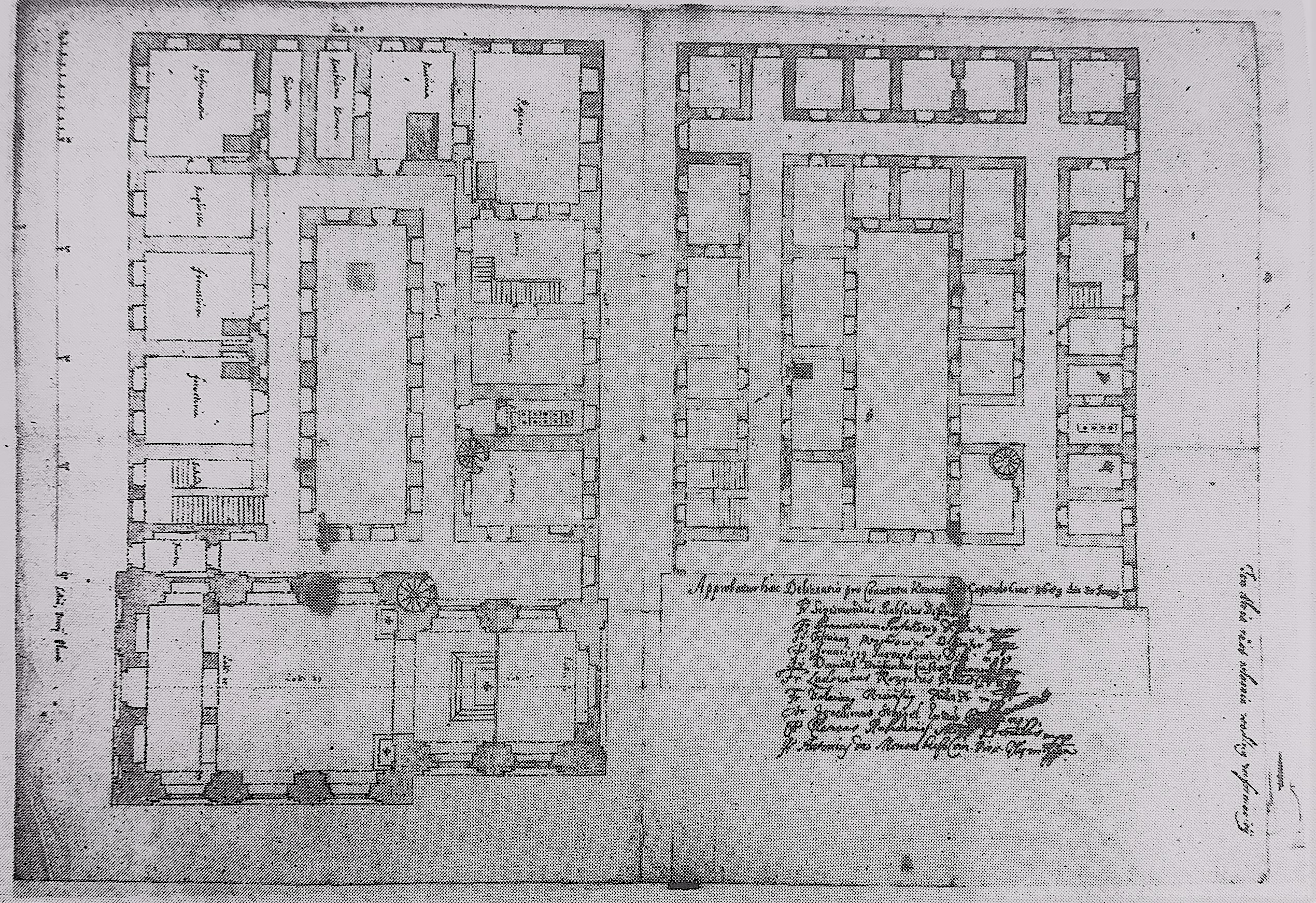 Plan klasztoru reformatów. Kęty. Proj. niezrealizowany. J.M.Link. 1689 r.